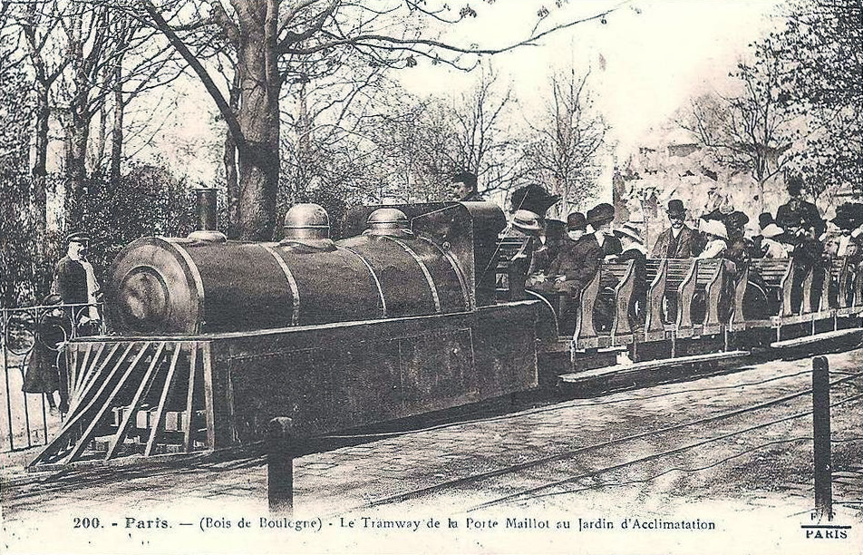 Bois de Boulogne. Le Tramway de la Porte Maillot au Jardin d'Acclimatation, Paris (France).